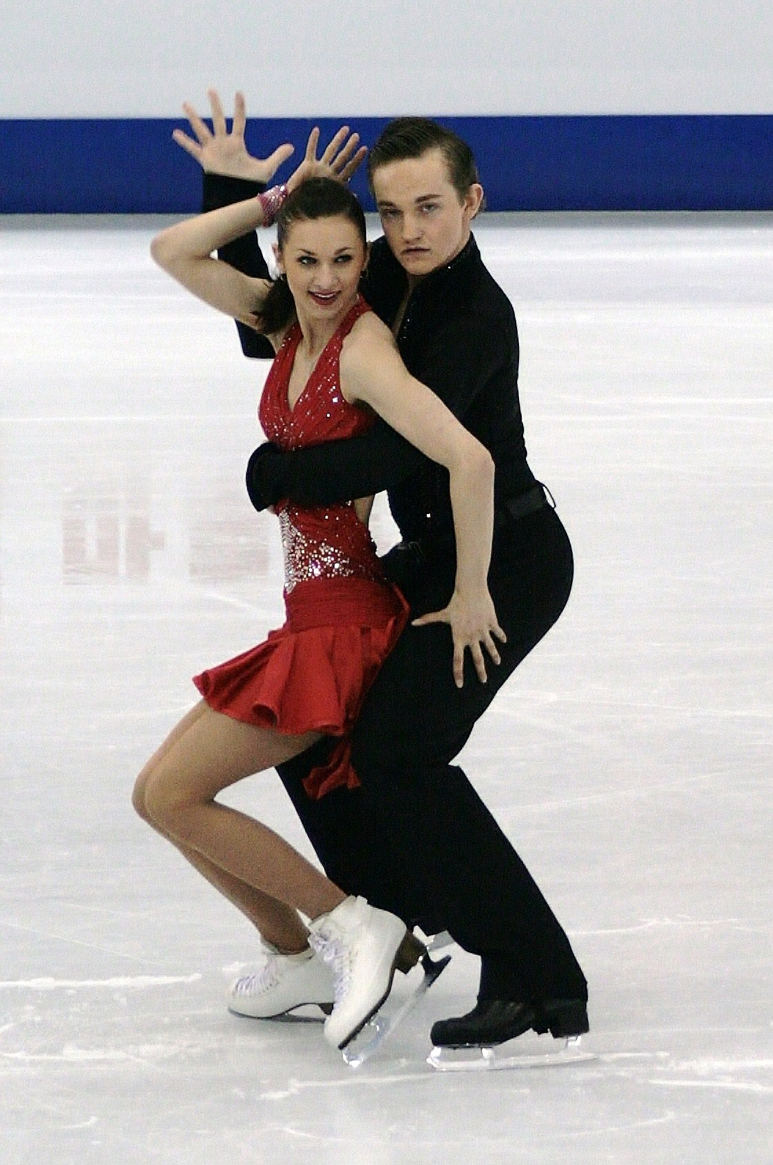 Ирина Шторк и Таави Ранд (Эстония) на чемпионате мира по фигурному катанию 2012.